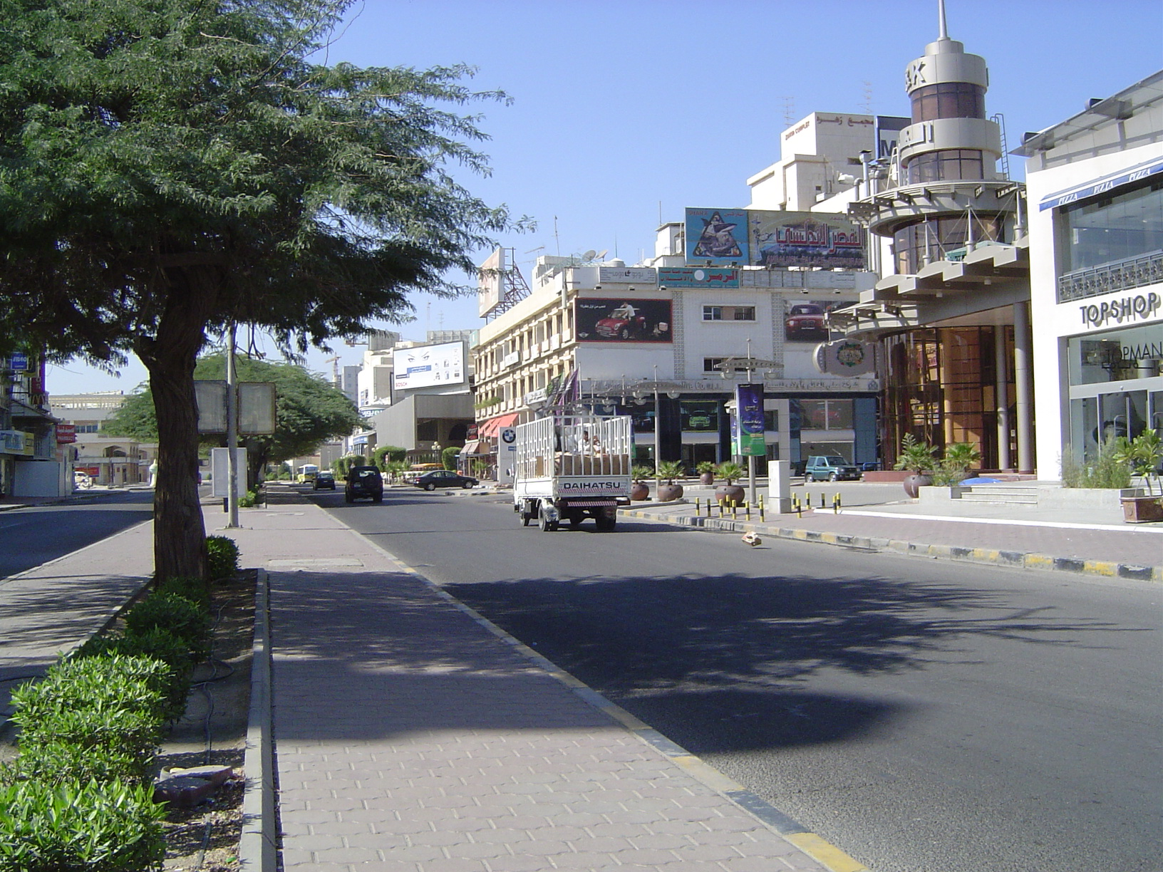 in kuwait